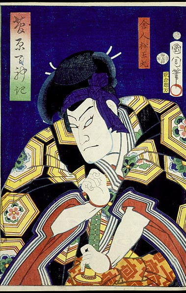 Shikan Nakamura IV (四代目中村芝翫) as Toneri Matsuō-maru in the play Sugawara Denju Tenarai Kagami